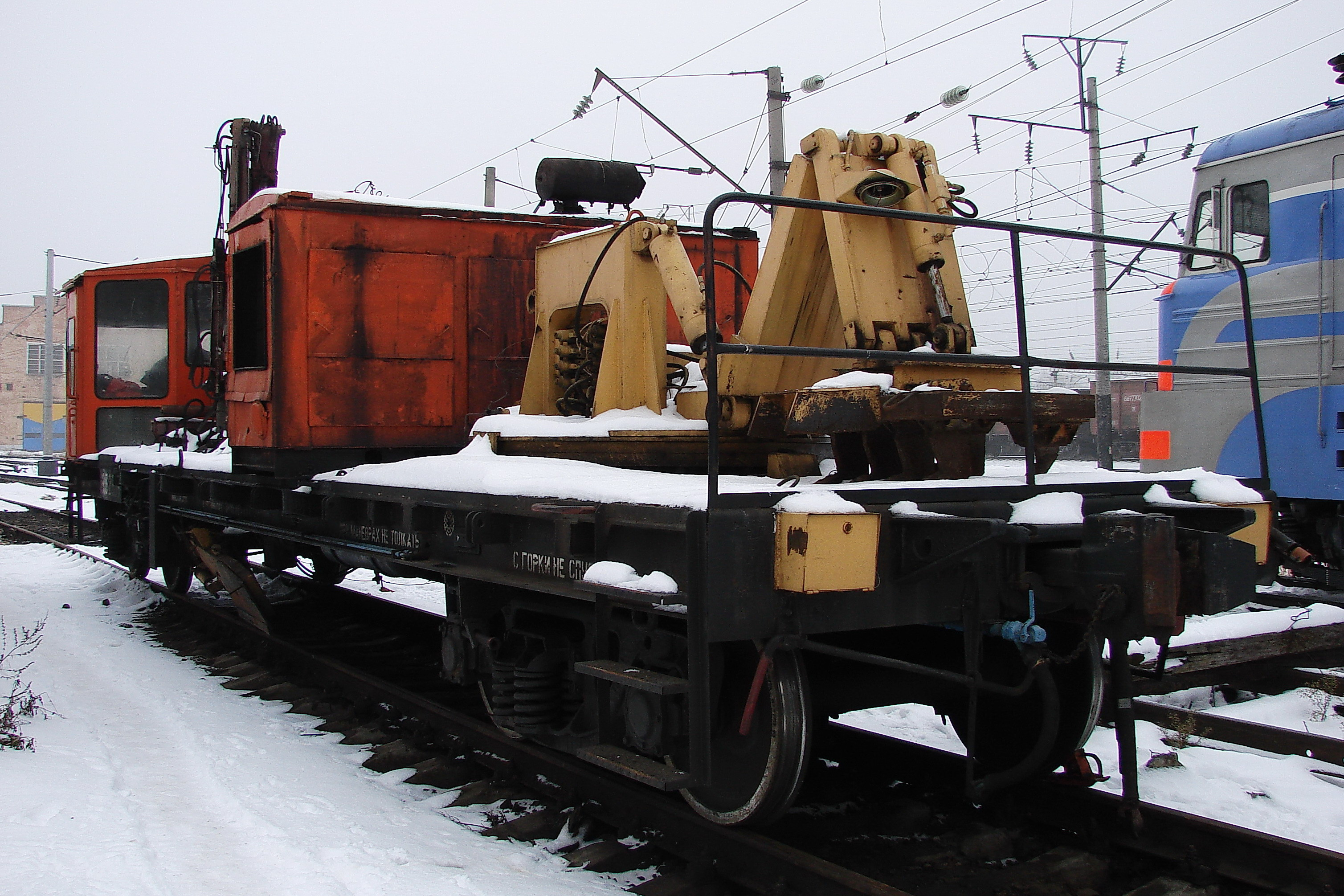 Механизированный отделочный комплекс (MOK).